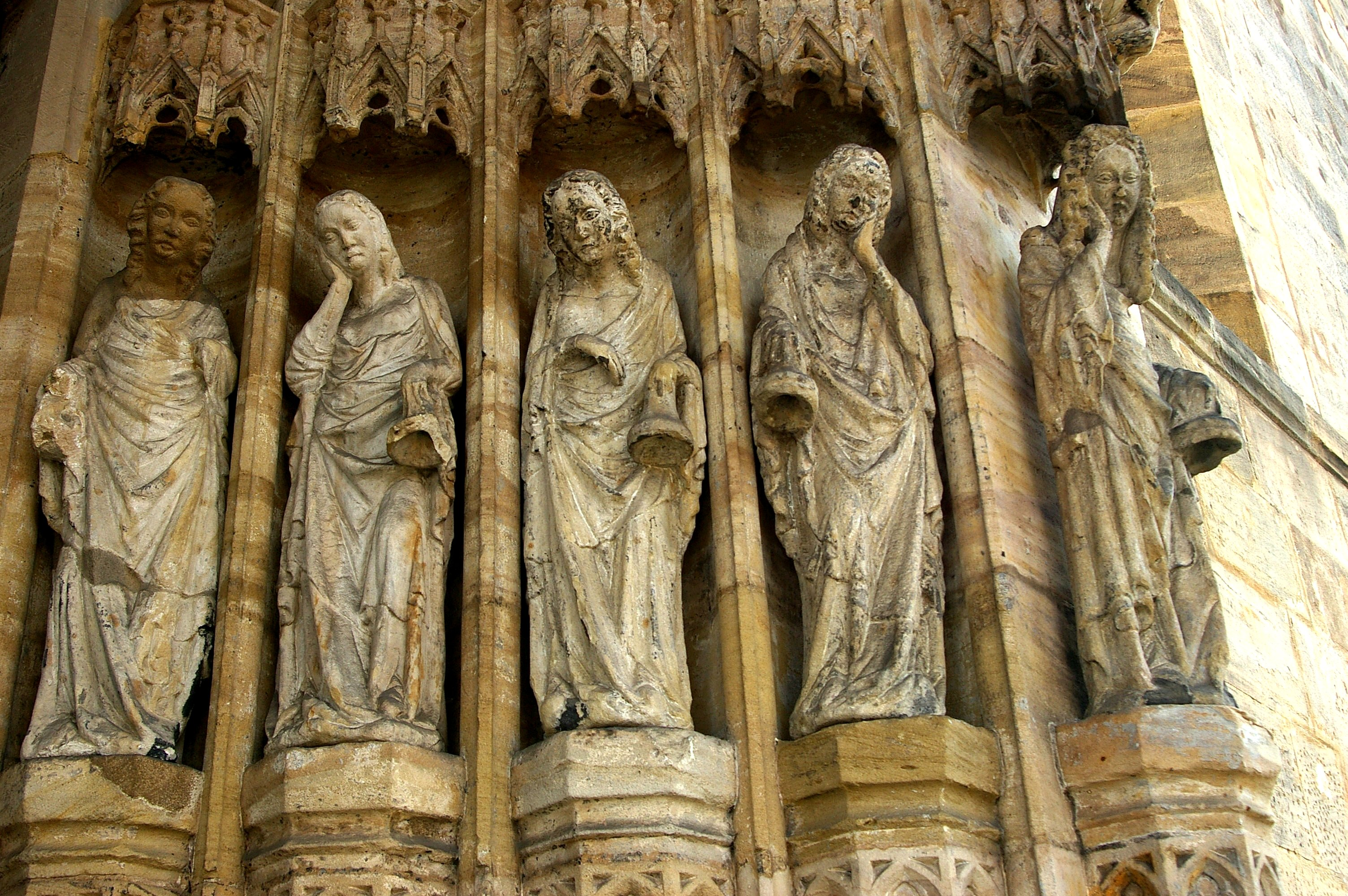 Bamberg - Obere Pfarre - Brautpforte, die törichten Jungfrauen (Foolish virgins), um 1380/90